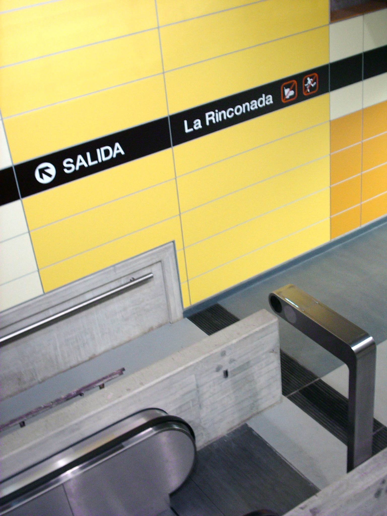 Estación La Rinconada Linea 3 - Ferrocarril Valles del Tuy